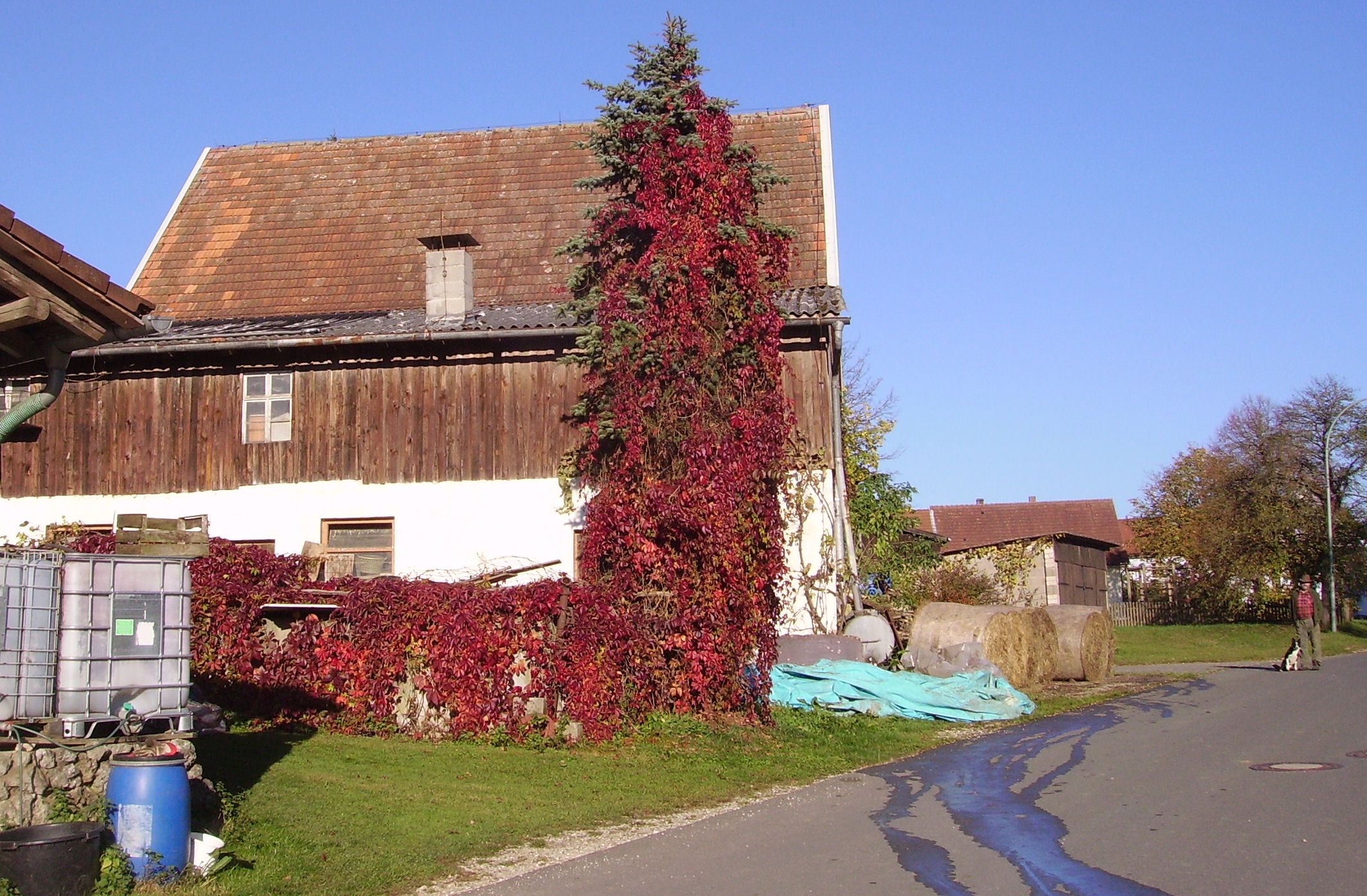 view of Siegritz, part of Heiligenstadt in Oberfranken in Upper Franconia, Germany